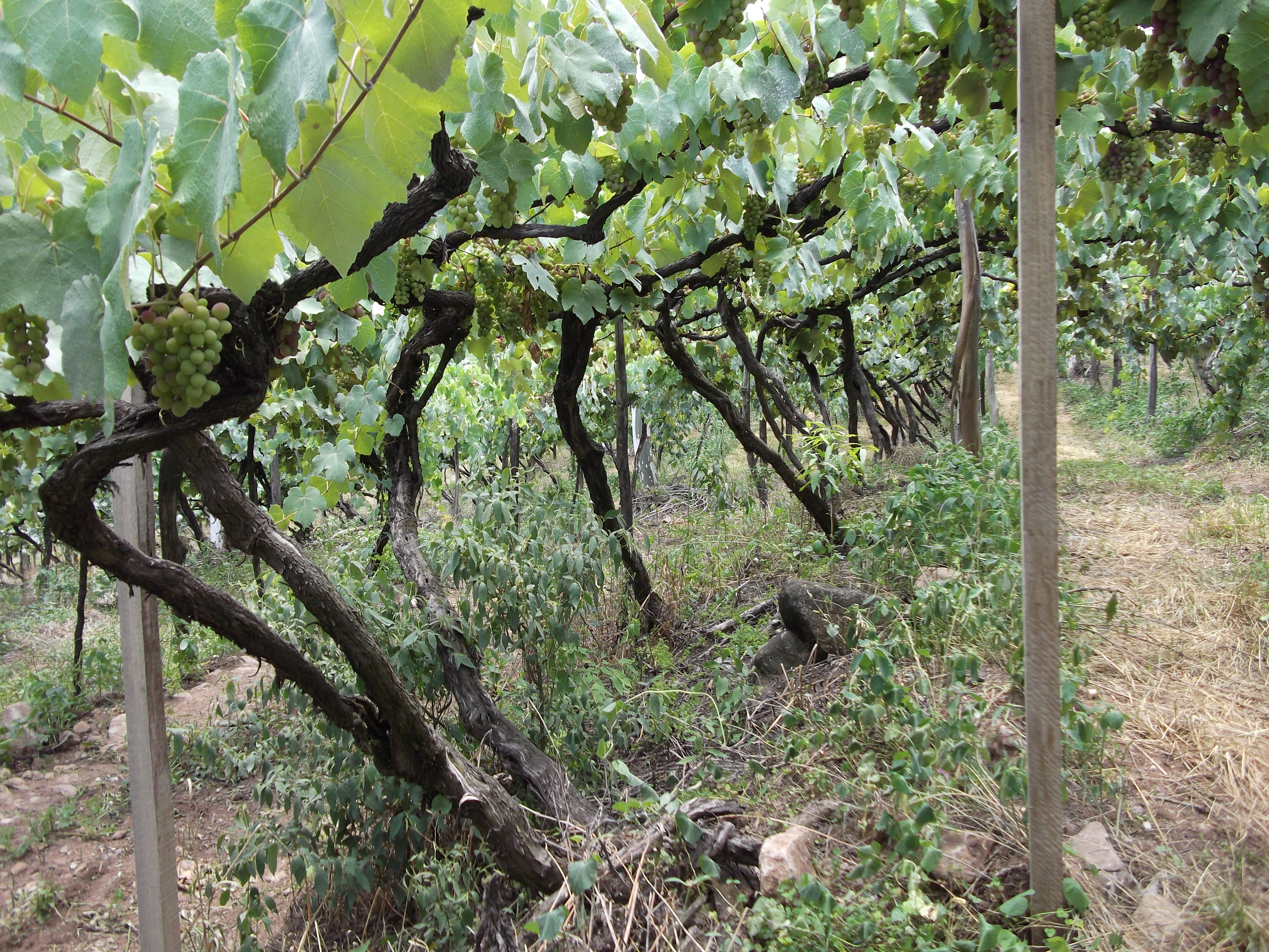 Vinhas da Vinícola Torcello (Bento Gonçalves, Brasil) : Mais de 100 anos